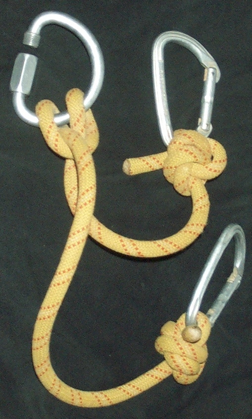 Longe